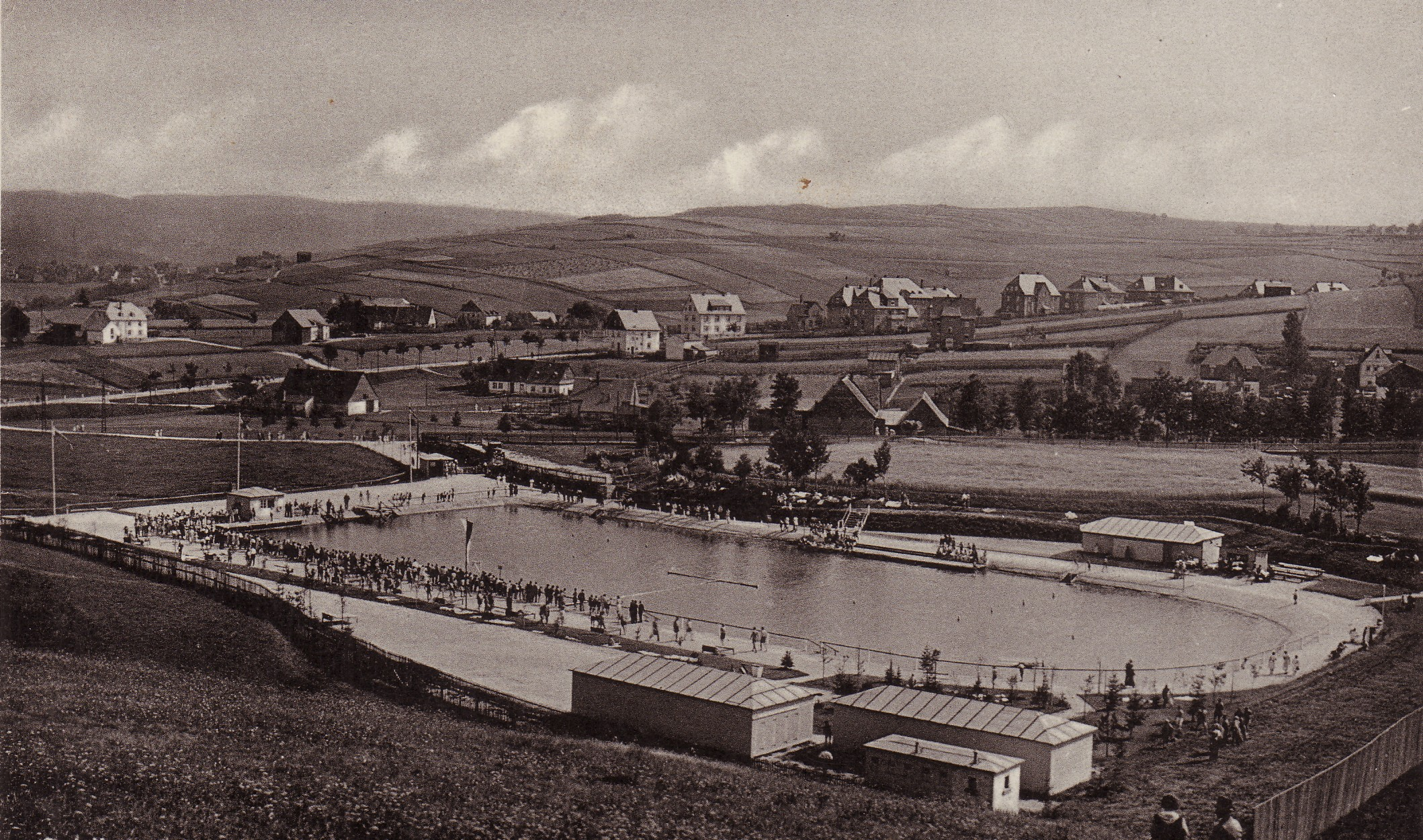 Schönheide im Erzgebirge: Das Gemeindebad Schönheides wurde in den 1920er/1930er Jahren in der damals noch selbständigen Nachbargemeinde Neuheide gebaut. Das Wasser des Filzbachs speiste es, es floß durch das Schwimmbad, dessen Wasser dadurch nie von der Sonne erwärmt wurde, ein Bad für Abgehärtete. Das Schwimmbad war so konzipiert, daß im Winter eine Eisfläche in einer Größe entstand, die Eishockeyspiele des örtlichen Eishockeyvereins zuließ. Die bei Spielen um die mit einer Bretterplanke von etwa einem Meter Höhe umgebenen Spielfläche Stehenden wärmten ihre Füße, indem sie gegen die Bretterplanke schlugen - Anfeuerung der besonderen Art.Füße- und herzerwärmend! Die Natureisbahn wurde bis in die 1980er Jahre betrieben, eine Beleuchtungsanlage ließ auch Spiele bei Dunkelheit zu. Legendär ist die Schönheider Eishockeymannschaft der 1940er und 1950er Jahre, die sogar in der DDR-Oberliga spielte. - Im Hintergrund ist der Ortsteil Schwarzwinkel (Schönheide) zu sehen: Die Bebauung aus den 1930er Jahren zieht sich an der Schneeberger Straße entlang, die ebenfalls in dieser Zeit entstand. Der unbewaldete "Hügel" im Hintergrund ist die "Allee", früher auch Oberförsterknock genannt, 684 Meter hoch. Dahinter wiederum liegt das Zentrum von Schönheide, das sich im Tal des Dorfbachs entlang zieht.